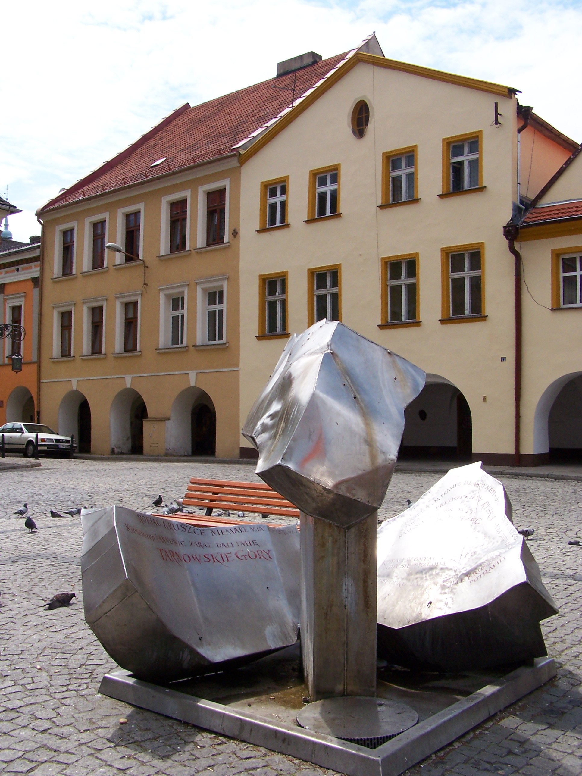 Pomnik i Kamienice Podcieniowe przy Rynku w Tarnowskich Górach (dokł. nry 17 i 18